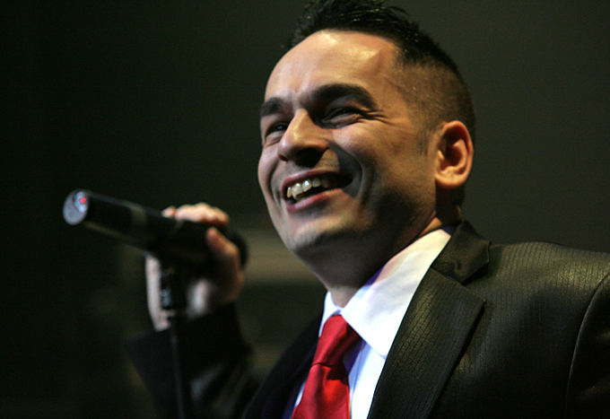 Стив Нагави